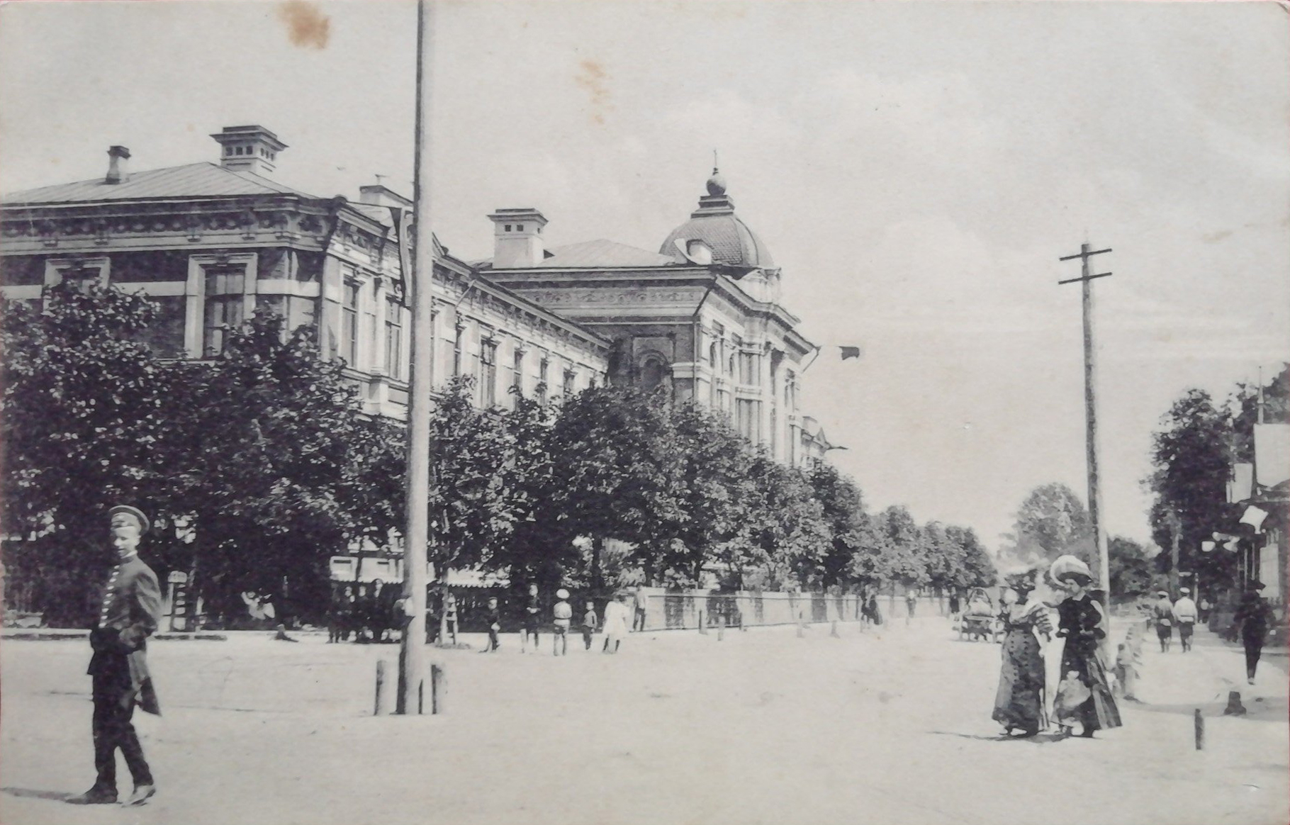 Беларуская (тарашкевіца): Гомель (Homiel), вуліца Гімназічная (vulica Gimnazičnaja). Мужчынская гімназія